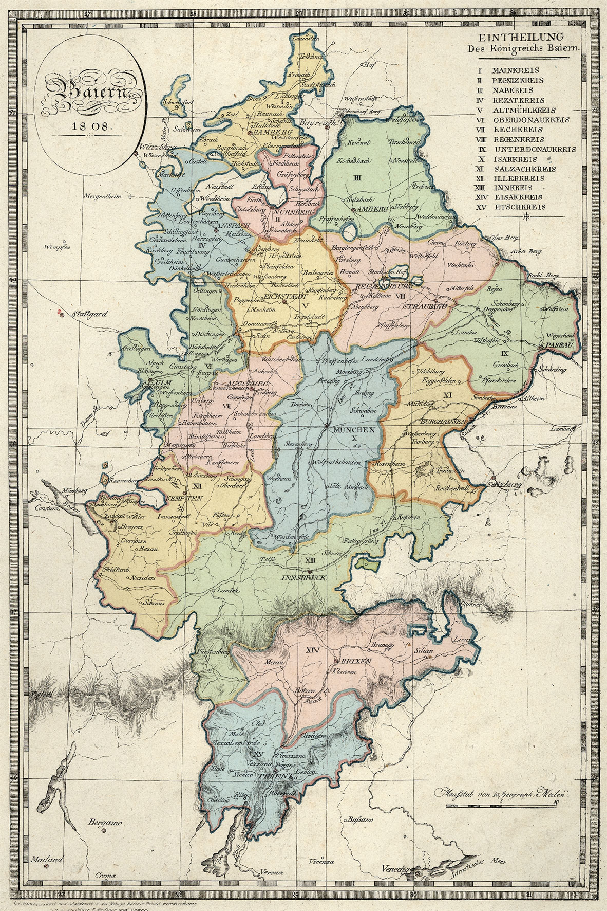 Karte von Bayern 1808